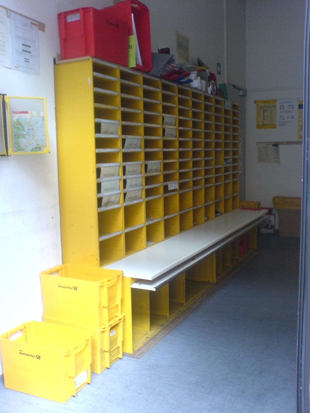 Deutsche Post AG, Postfachschränke (Rückseite) — München, Thierschstraße